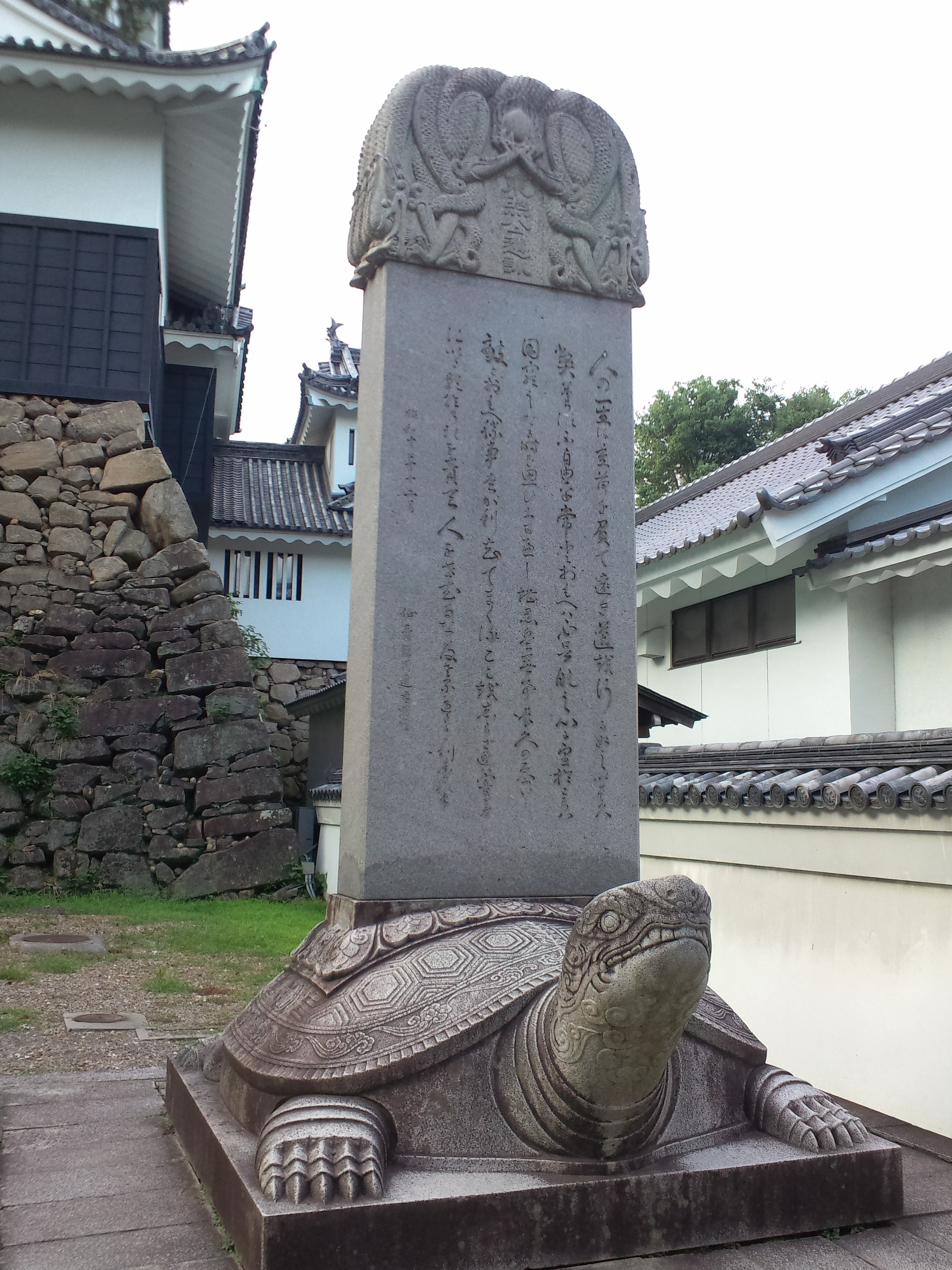 岡崎城 東照公遺訓碑